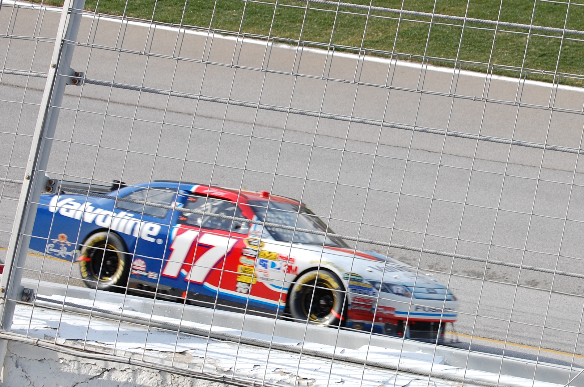 Matt Kenseth